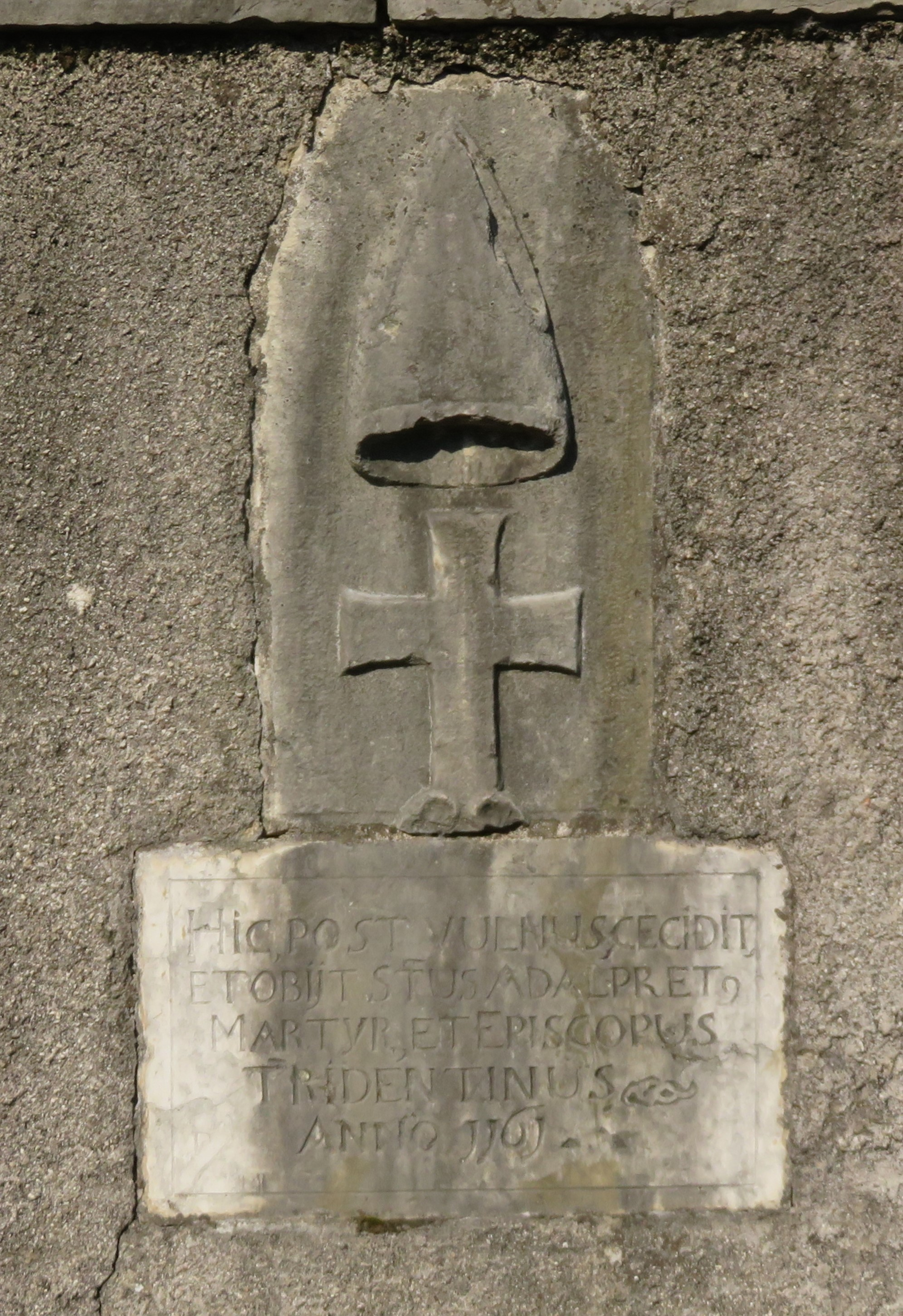 documento storico messo in dubbio nella sua autenticità da Girolamo Tartarotti